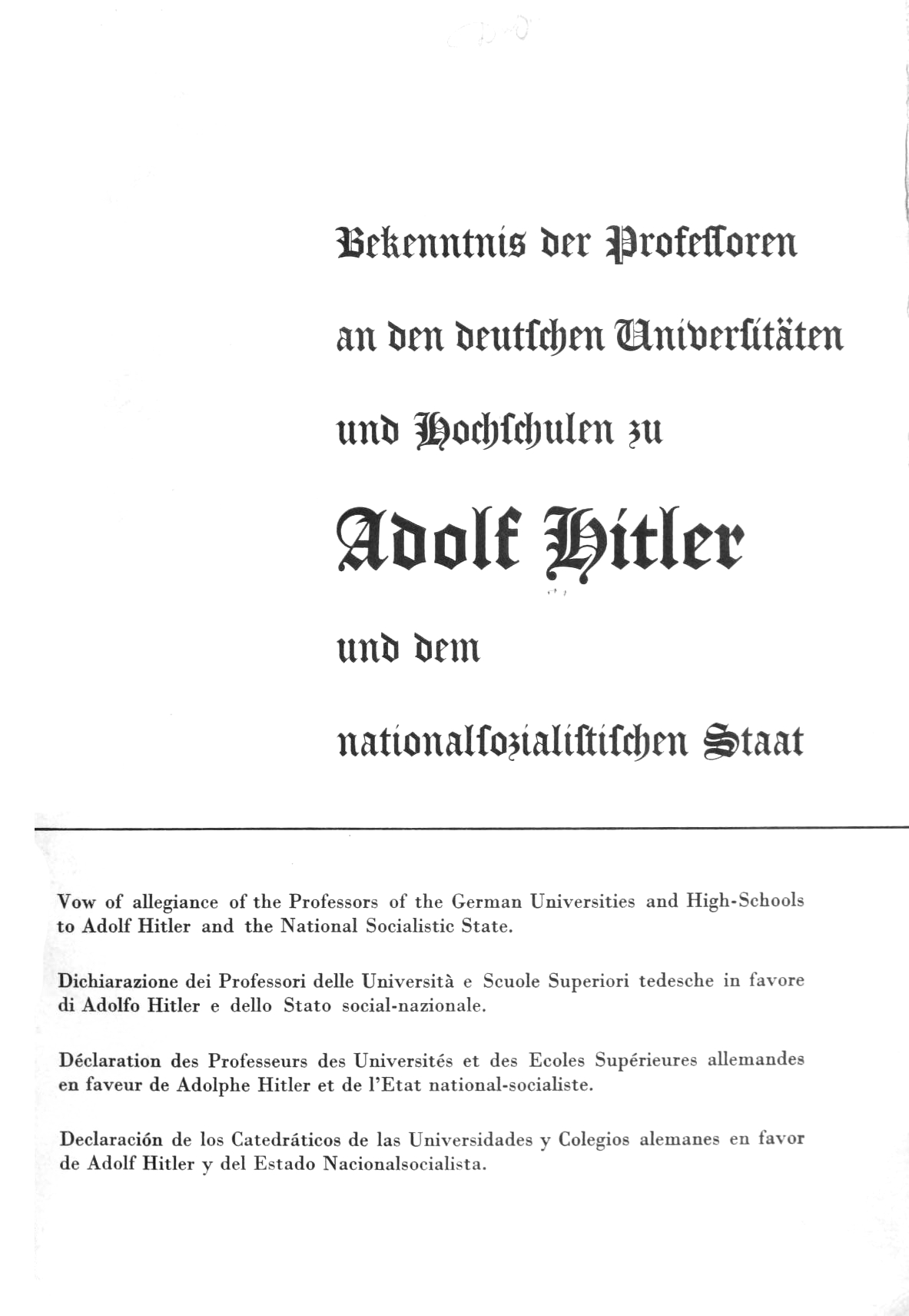 Bekenntnis der Professoren an den Universitäten und Hochschulen zu Adolf Hitler und dem nationalsozialistischen Staat; überreicht vom Nationalsozialistischen Lehrerbund Deutschland-Sachsen